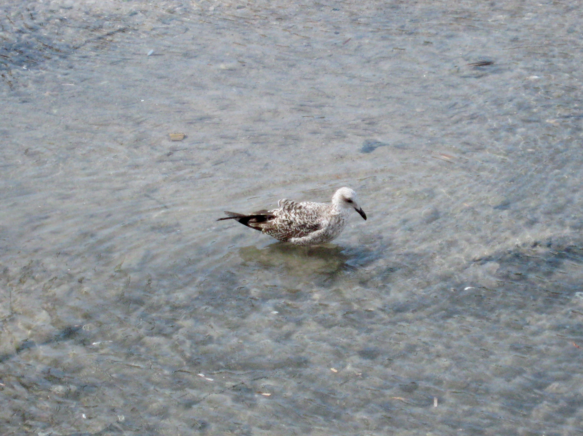 Junge Möwe (wahrscheinlich Mittelmeermöwe – Larus michahellis) am Strand von Port de Sóller, Gemeinde Sóller, Mallorca, Spanien